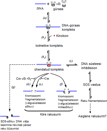 Kinolooni mehhanismi skeem, kus sihtmärgiks on güraas. (a) Güraasis sidumine DNA külge. (b) Kinoloon-güraas-DNA kompleksi teke, mis kiiresti piirab DNA replikatsiooni. (b1) Näitab kinoliini sidumist güraas-DNA kompleksile enne DNA lõhenemist. (b2) seondumine peale DNA lõhestumist. (c) Replikatsiooni inhibitsioon viib SOS-vastuse indutseerimisele ja raku filamenteerumisele (d) Surmav kromosoomi fragmentatsioon, mis nõuab valgusünteesi aeroobsetes tingimustes. (e) Surmav kromosoomi fragmentatsioon, mis nõuab valgusünteesi aga mitteaeroobsetes tingimustes. (f) Surmav kromosoomi fragmentatsioon, mis ei vaja valgusünteesi. (g) DNA hävinemist on täheldatud SDSi poolt peale raku lüüsumist. Küsimärgid näitavad, et ei ole kindel aeglase rakusurma toimumine ja, mis juhtub DNAga.